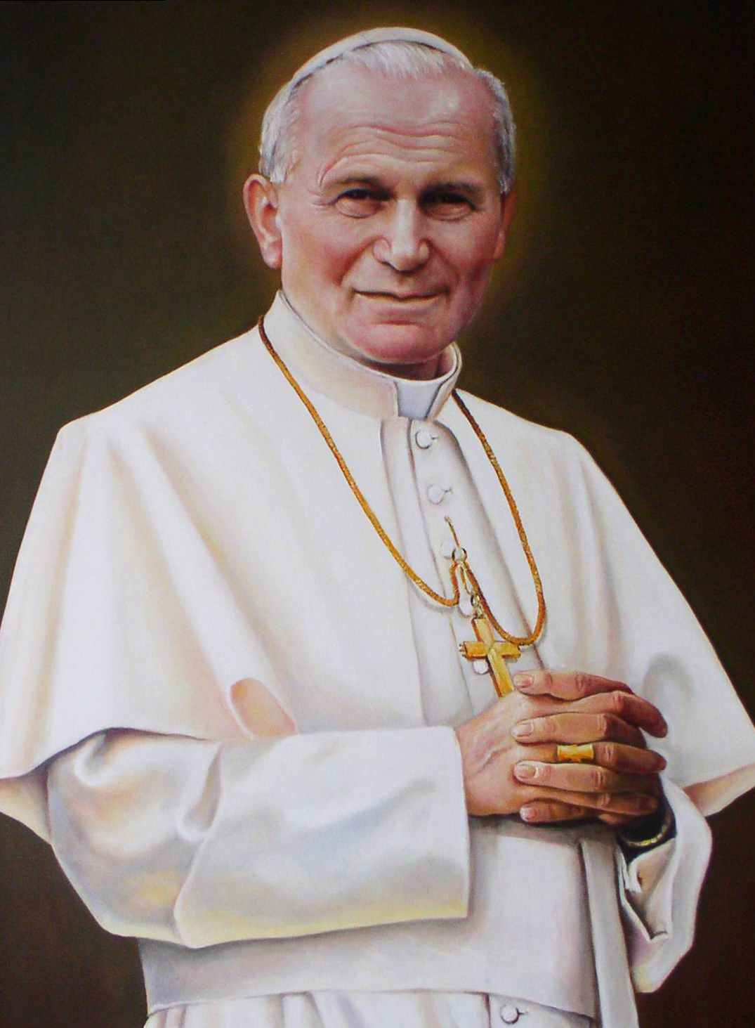 Portret autorstwa Zbigniewa Kotyłły( Kosciół Seminarium Lublin